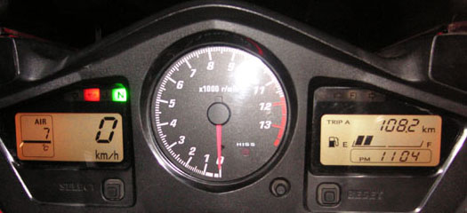 Tableau de bord d'une moto Honda VFR 2002.